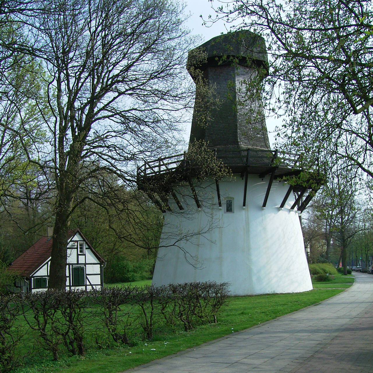 Bildbeschreibung: Windpumpwerk Saline Königsborn (Unna), 1750 über dem 1747 gebohrten Solebrunnen errichtet. Quelle: Eigenes Foto Fotograf/Zeichner: Smial Datum: 23.04.2006